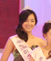 2009 미스코리아 당선자들